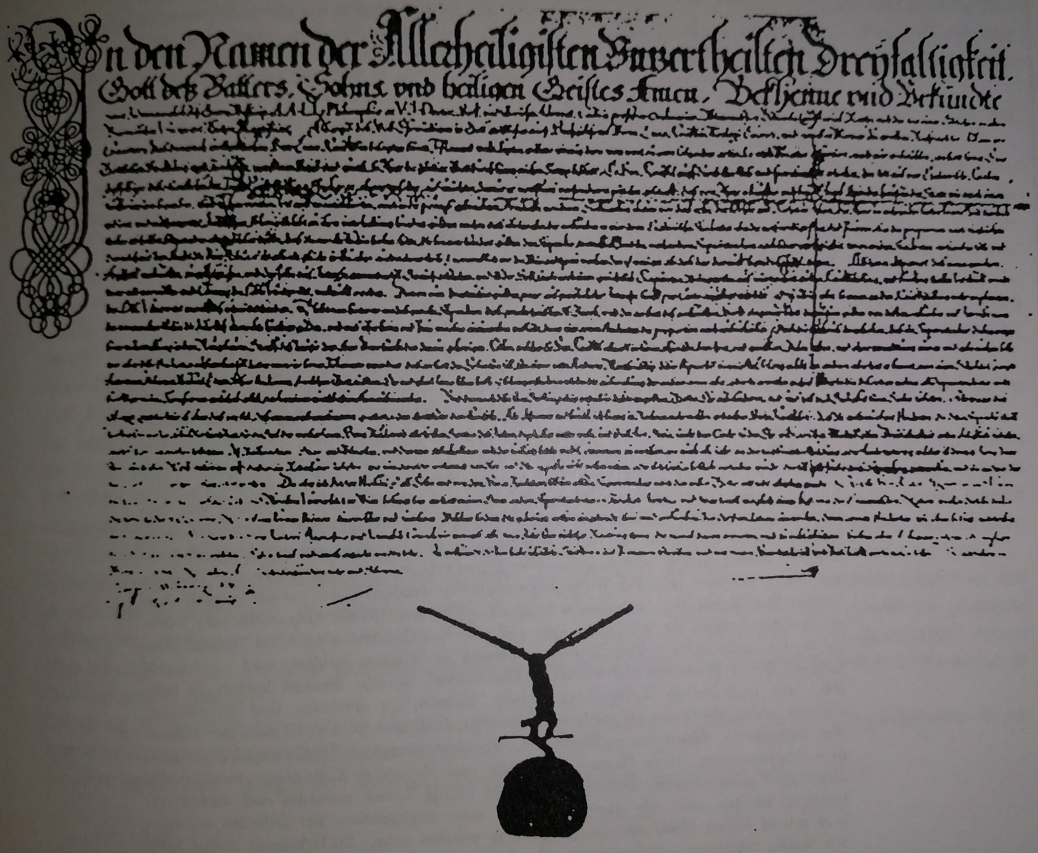 Ustanovna listina Knafljeve ustanove na Dunaju.